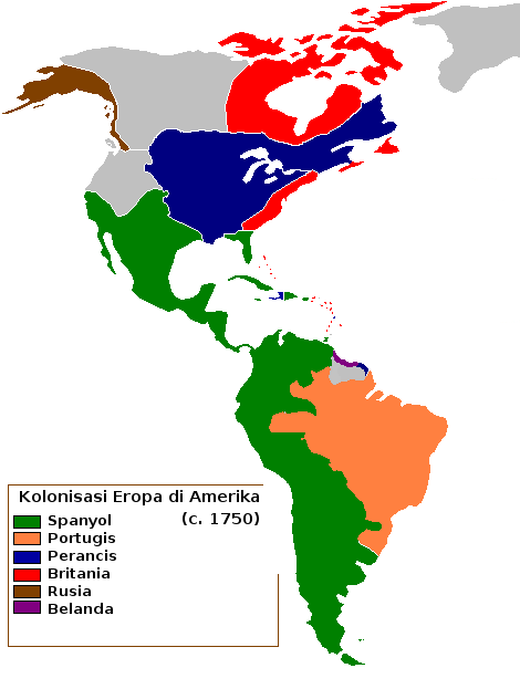 Kolonisasi Bangsa-Bangsa di Eropa di Amerika, circa 1750 diterjemahkan dari